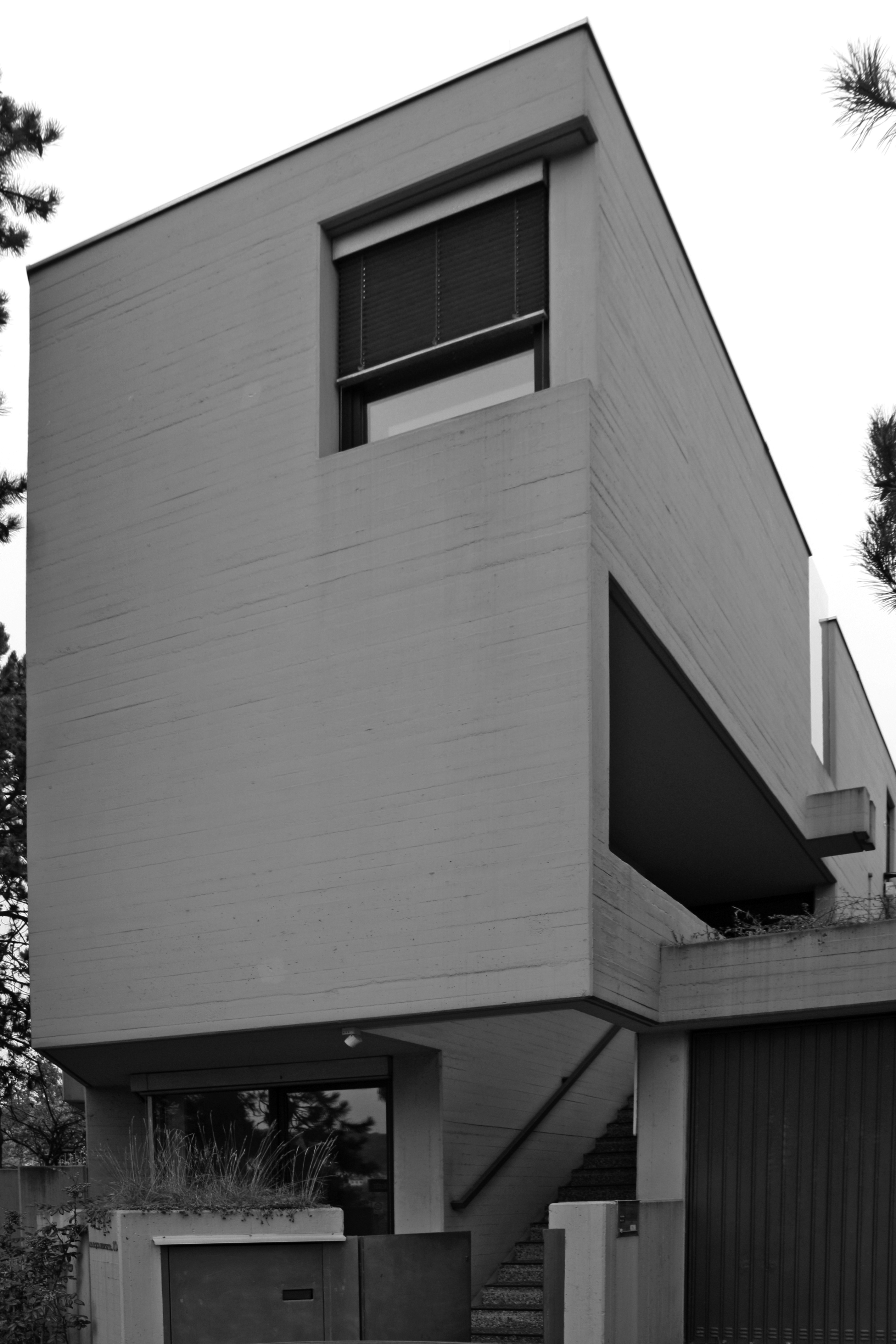 Wilfried Beck-Erlang: Haus Beck-Erlang in Stuttgart, 1964-66 (Eckansicht)